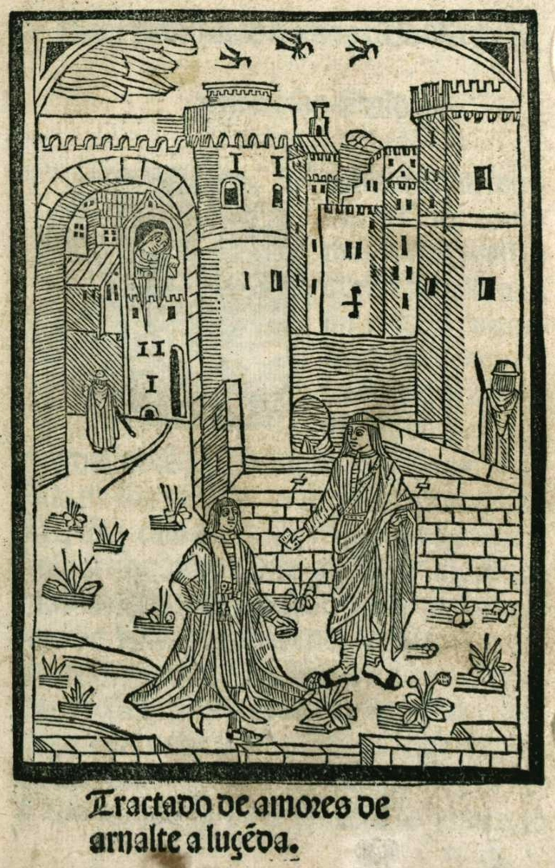 Portada del incunable Tratado de amores de Arnalte y Lucenda, novela sentimental de Diego de San Pedro, Burgos, Fadrique (Biel) de Basilea, 25 noviembre, 1491. CCPB000112342-4